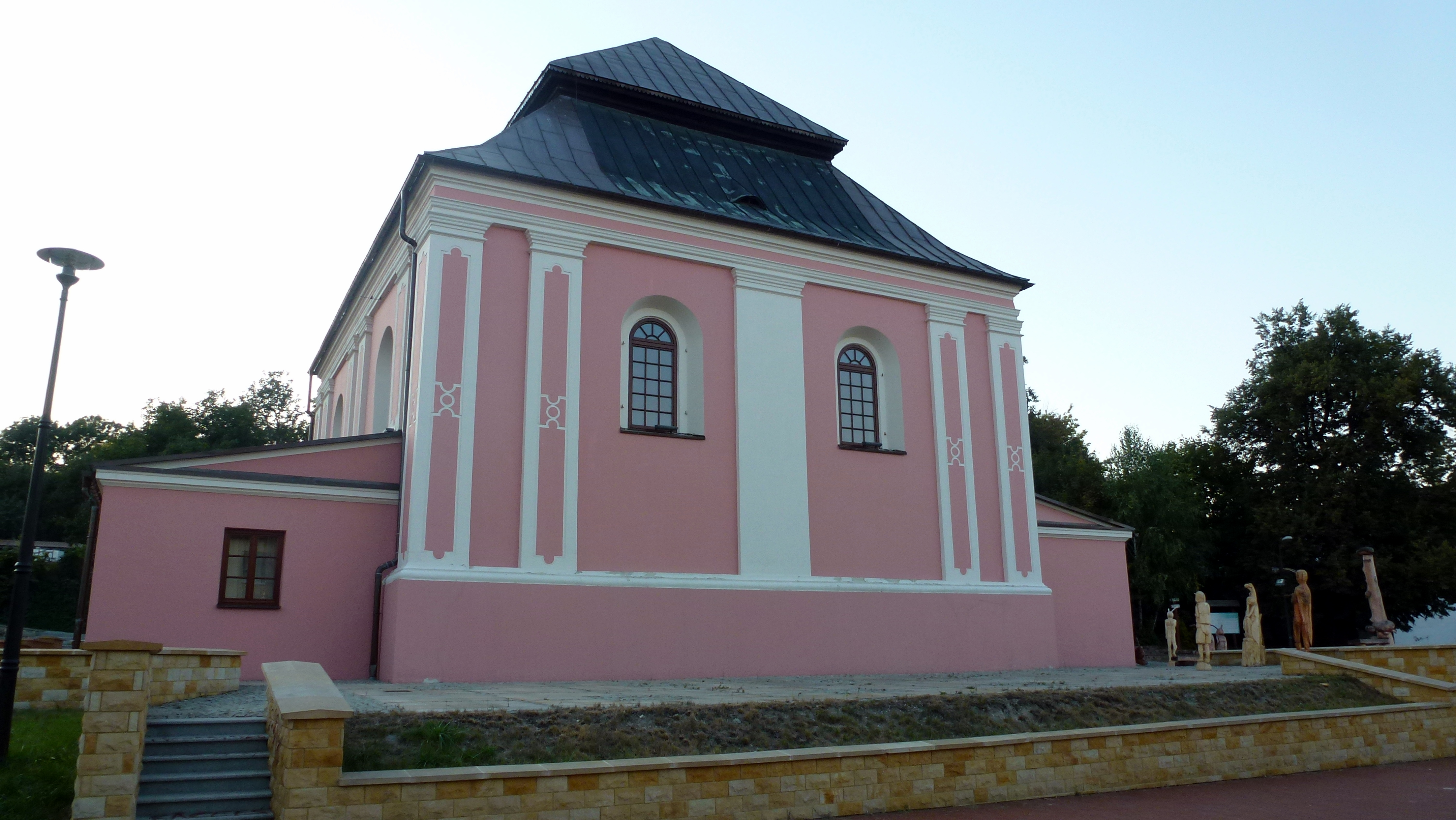 Szczebrzeszyn